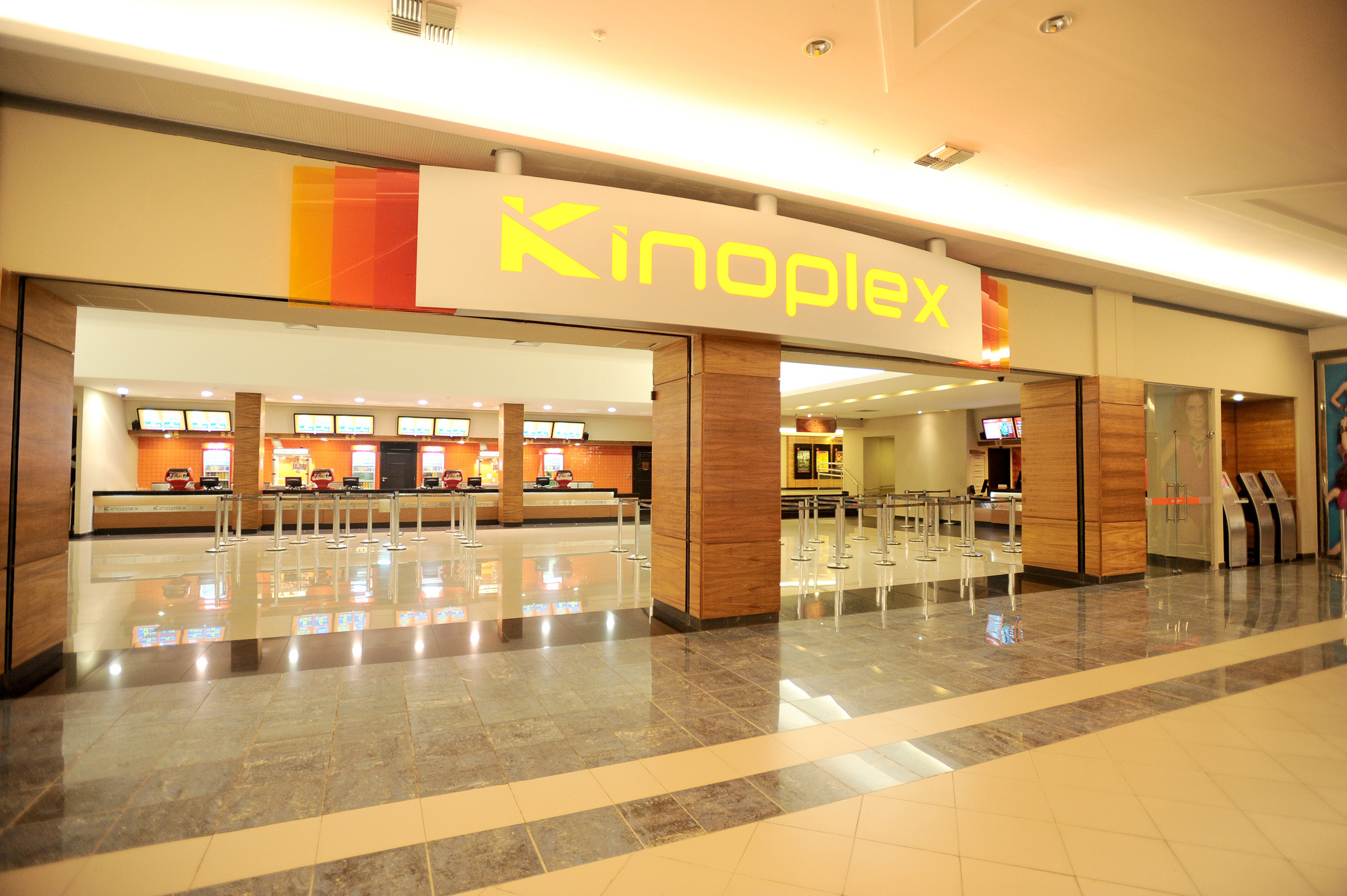 Kinoplex Maceió